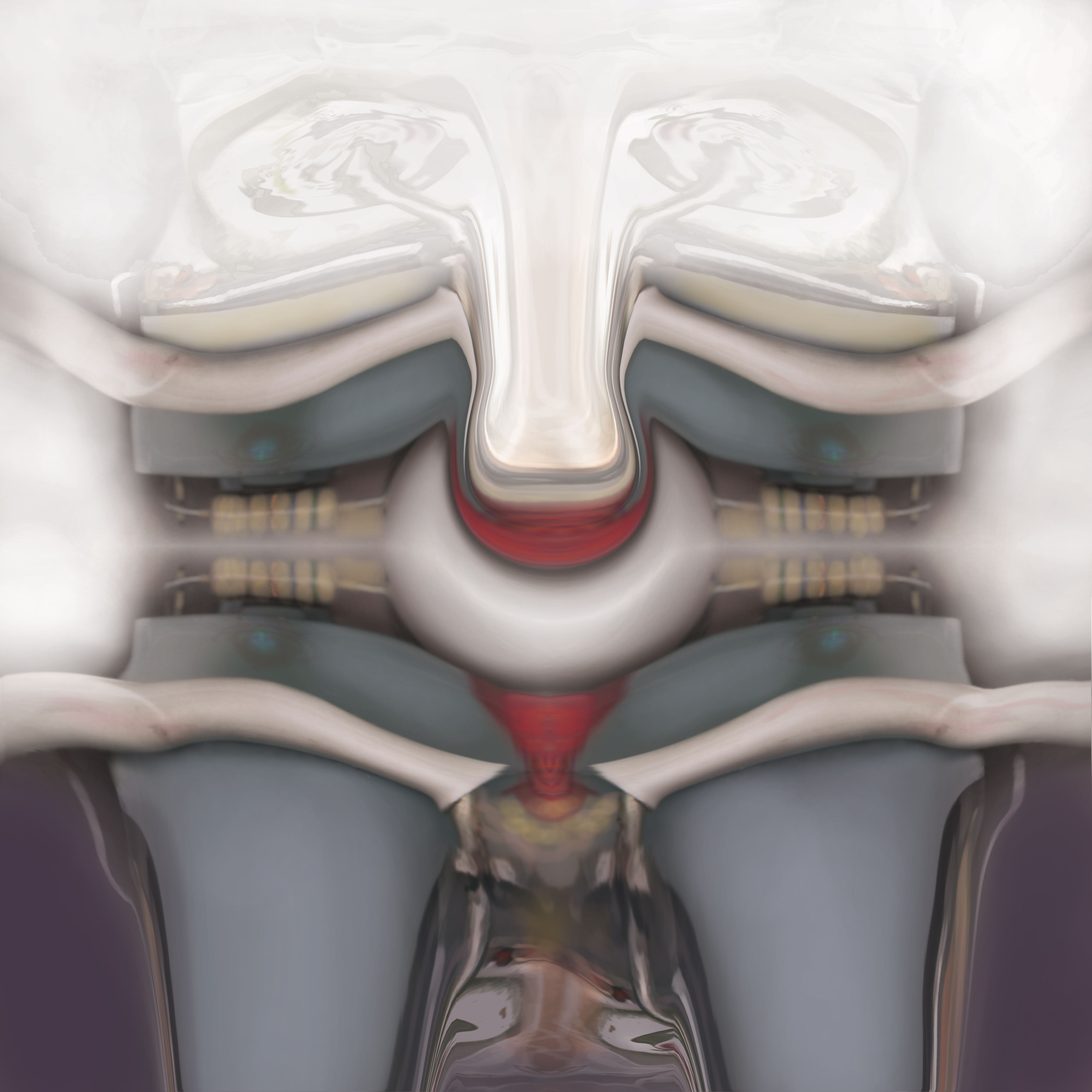 Alambique